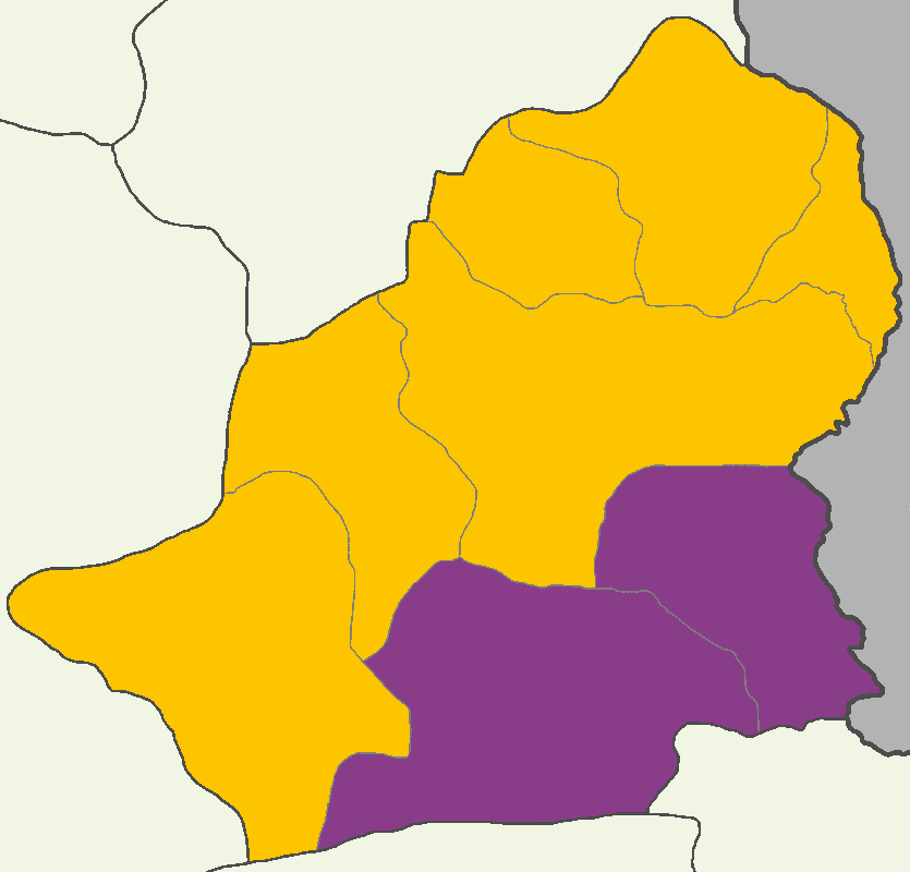 Kars'ta 2014 Türkiye cumhurbaşkanlığı seçimi sonuçları